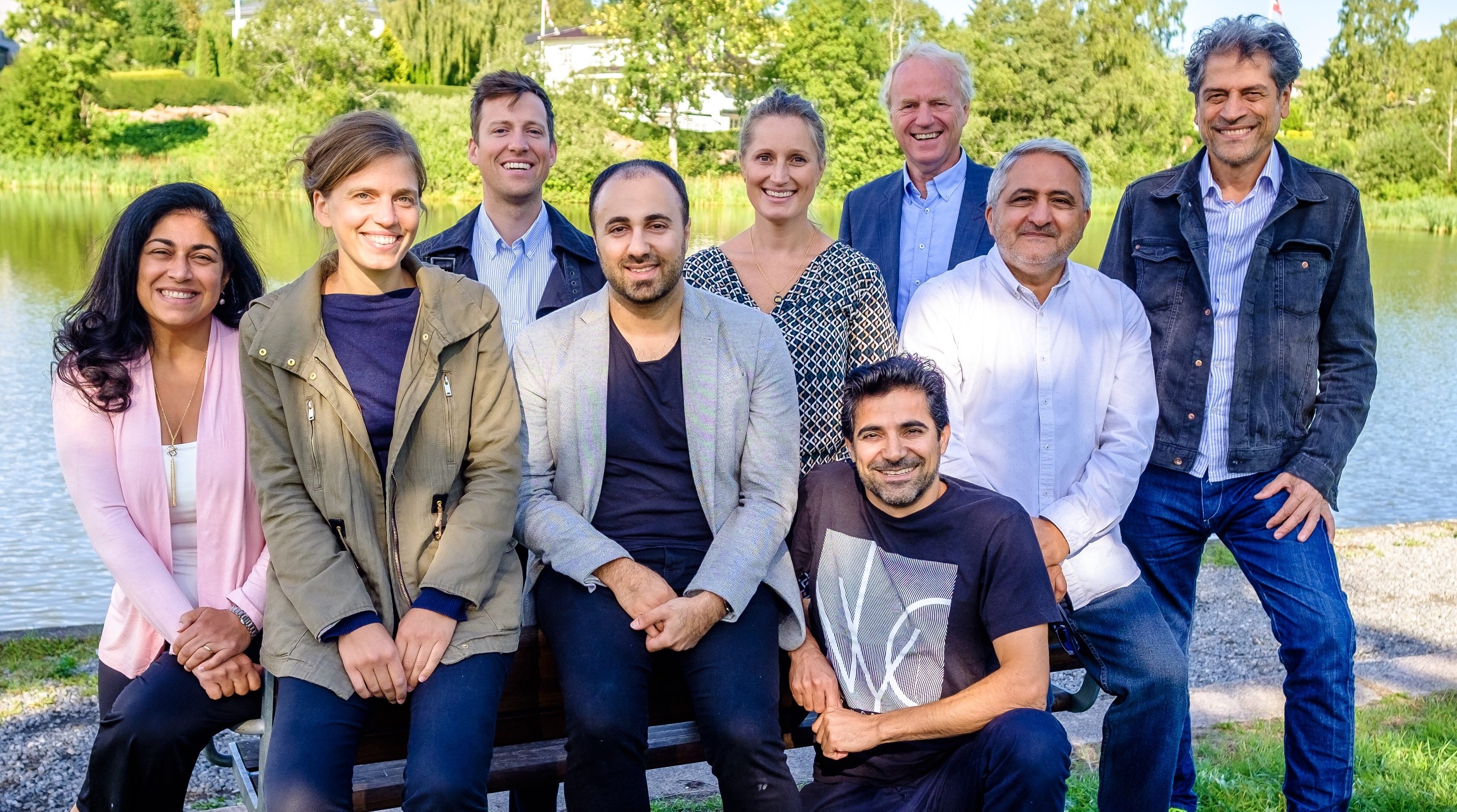 Nasjonalt Åndelig Råd for Bahá'íer i Norge 2018/19 består av f.v: Nazila Dabestani, Katlinn Clavier, Zack Livesay, Sasan Kamali, Lilli Martine Lerstad, Arsalan Moghen, Thor Henning Lerstad, Behnam Bahrami og Keyhan Ighanian.